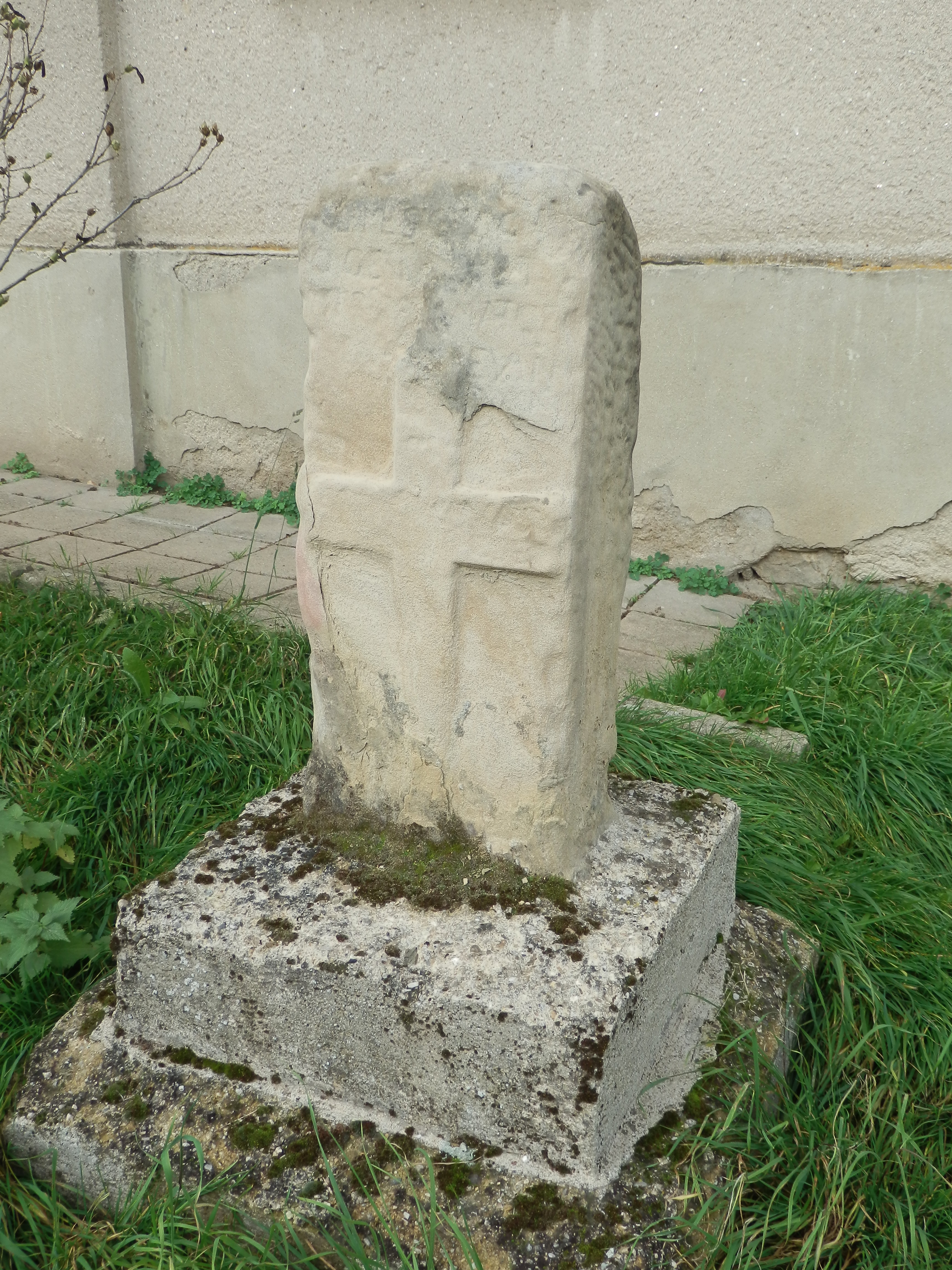 Pamětní kámen (Černčín), při škole, Černčín